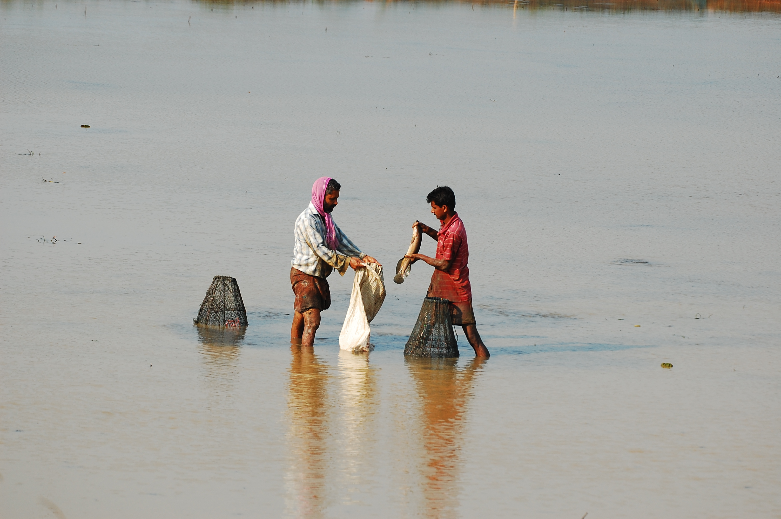 കോൾ പാടങ്ങളിൽ വെള്ളം വറ്റിച്ച് കുട്ട ഉപയോഗിച്ച് മീൻ പിടിക്കുന്നവർ